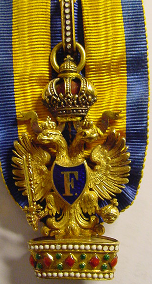 Order Żelaznej Korony, kolekcja Radeborn, Malmö